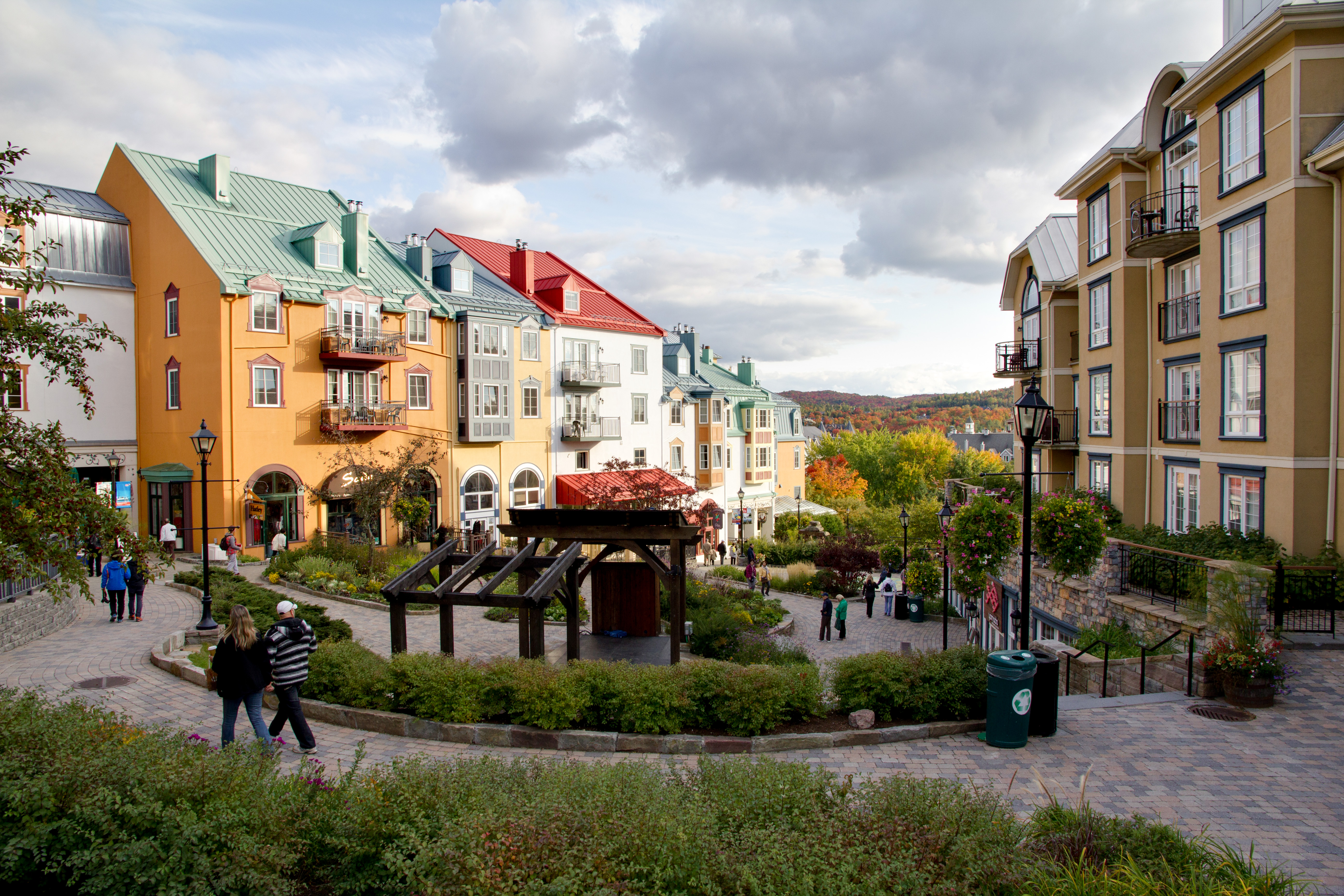 Mt-Tremblant, Quebec, Canada